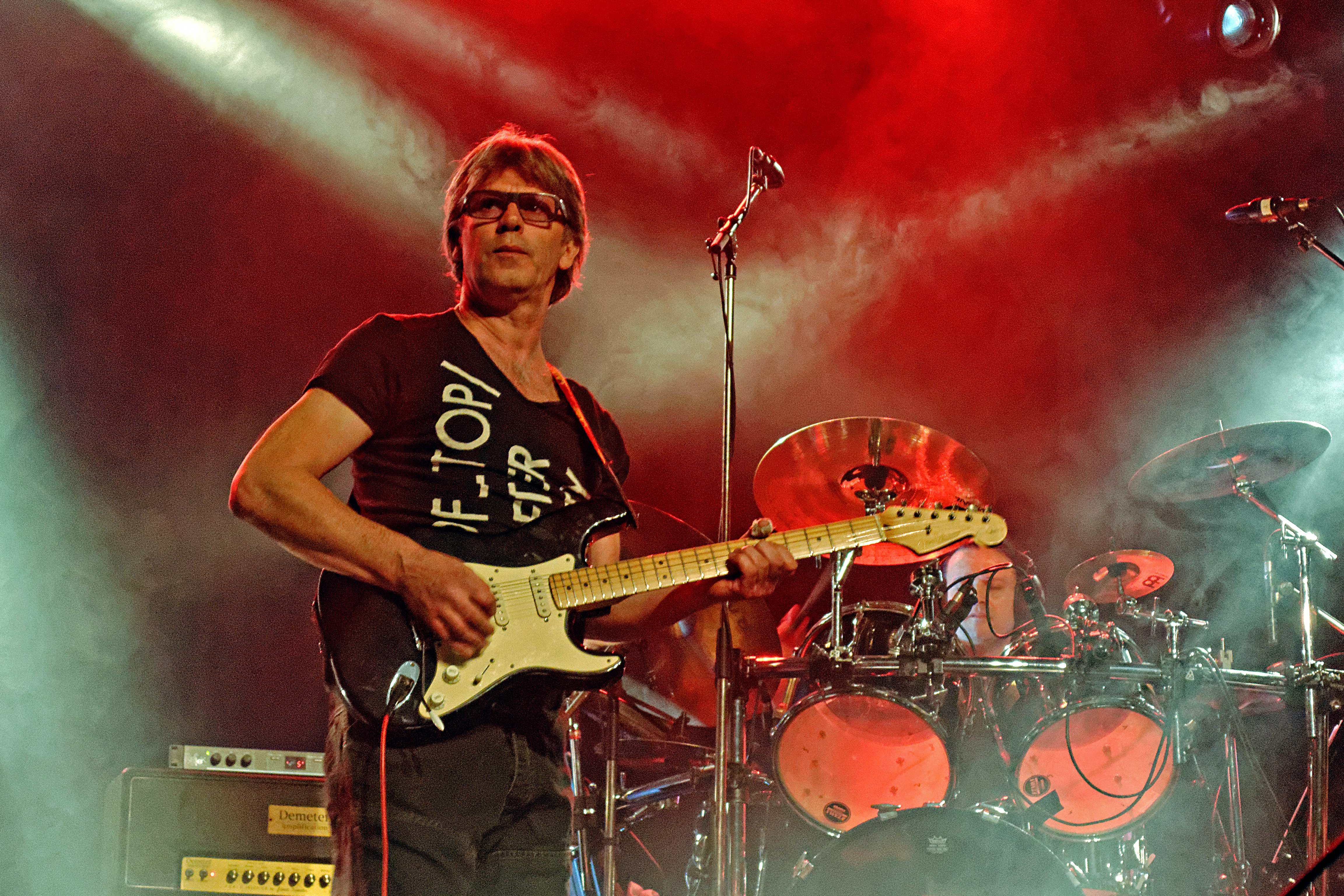 Concert de Breizharock avec la participation exceptionnelle de Dan Ar Braz salle de Tronjoly à Gourin au profit de la lutte contre la muco, organisé par la Pierre Le Bigaut.